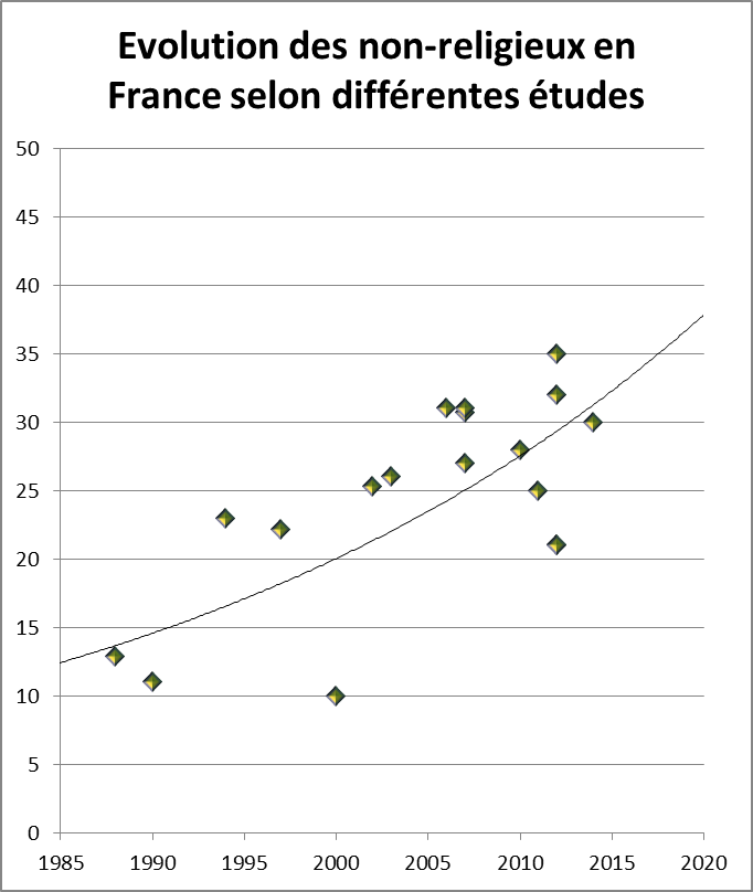 Sources : CEVIPOF, Pew Research Center, International Religious Freedom Report, IFOP, CSA, BVA, Dept Etat, Quid, IEPG